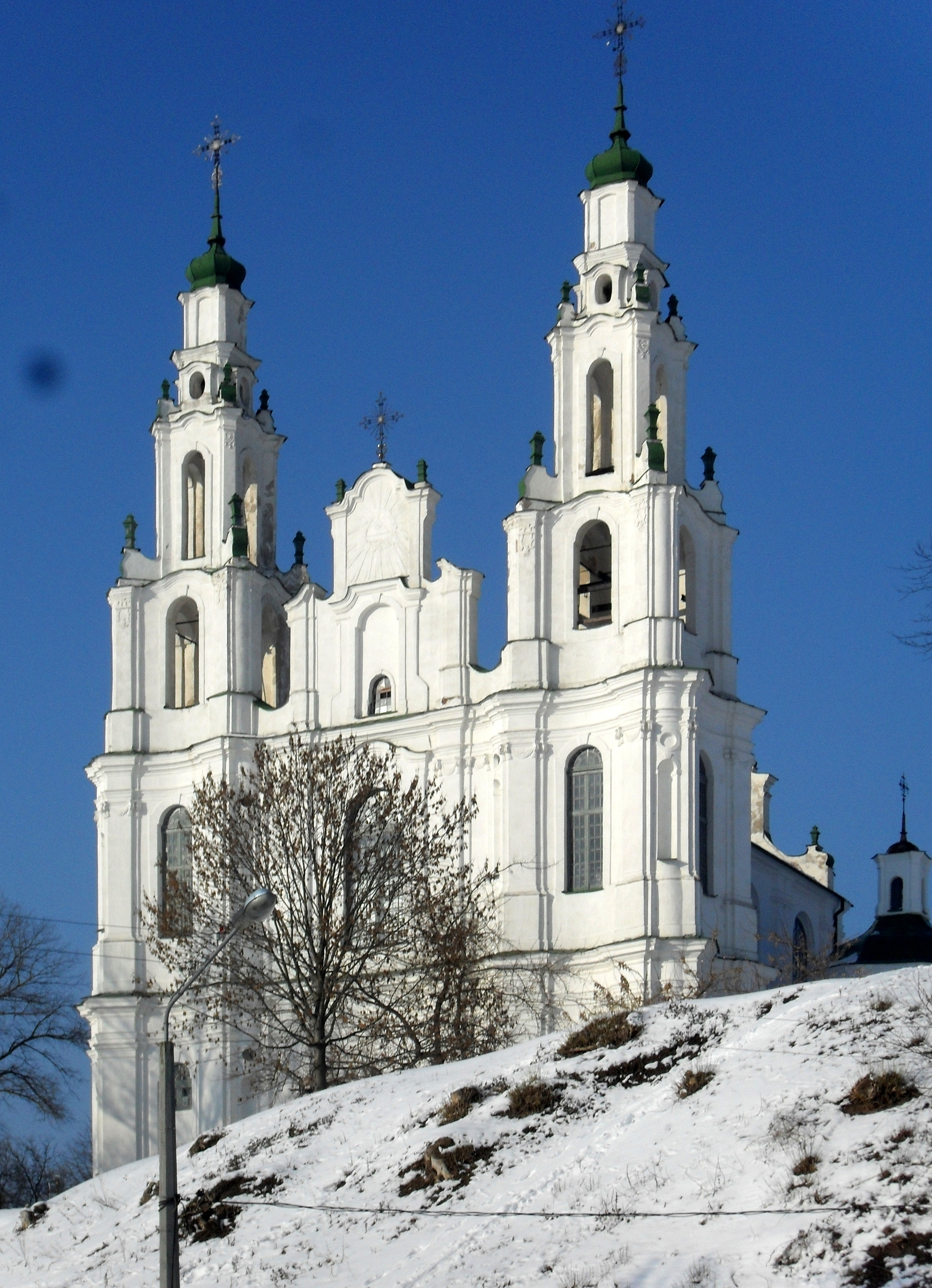 Беларуская (тарашкевіца): Сафійскі сабор. г. Полацак This is a photo of Belarusian heritage monument. Reference number: 210Г000606 ( WLM)